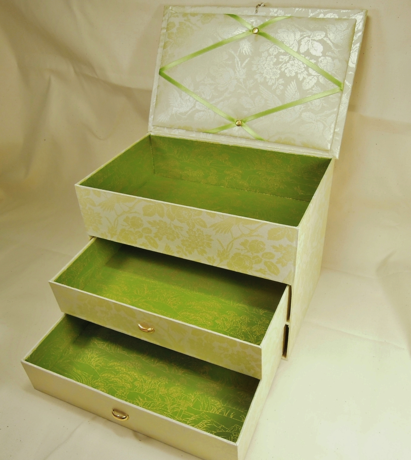 le cartonnage